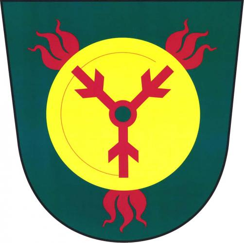 znak, Soběsuky, okres Kroměříž